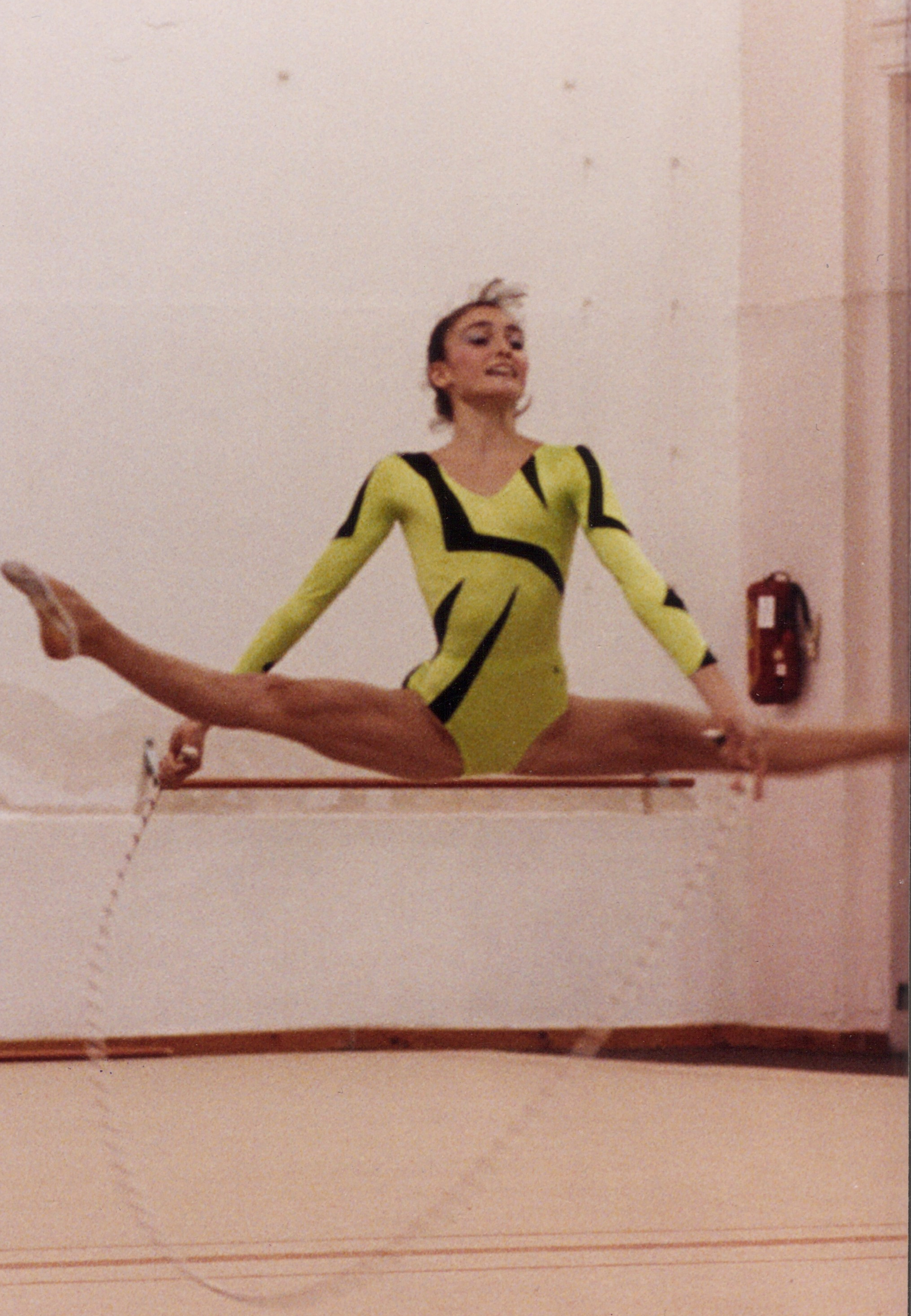 La gimnasta española Noelia Fernández durante un entrenamiento en el Gimnasio Moscardó de Madrid en 1990.